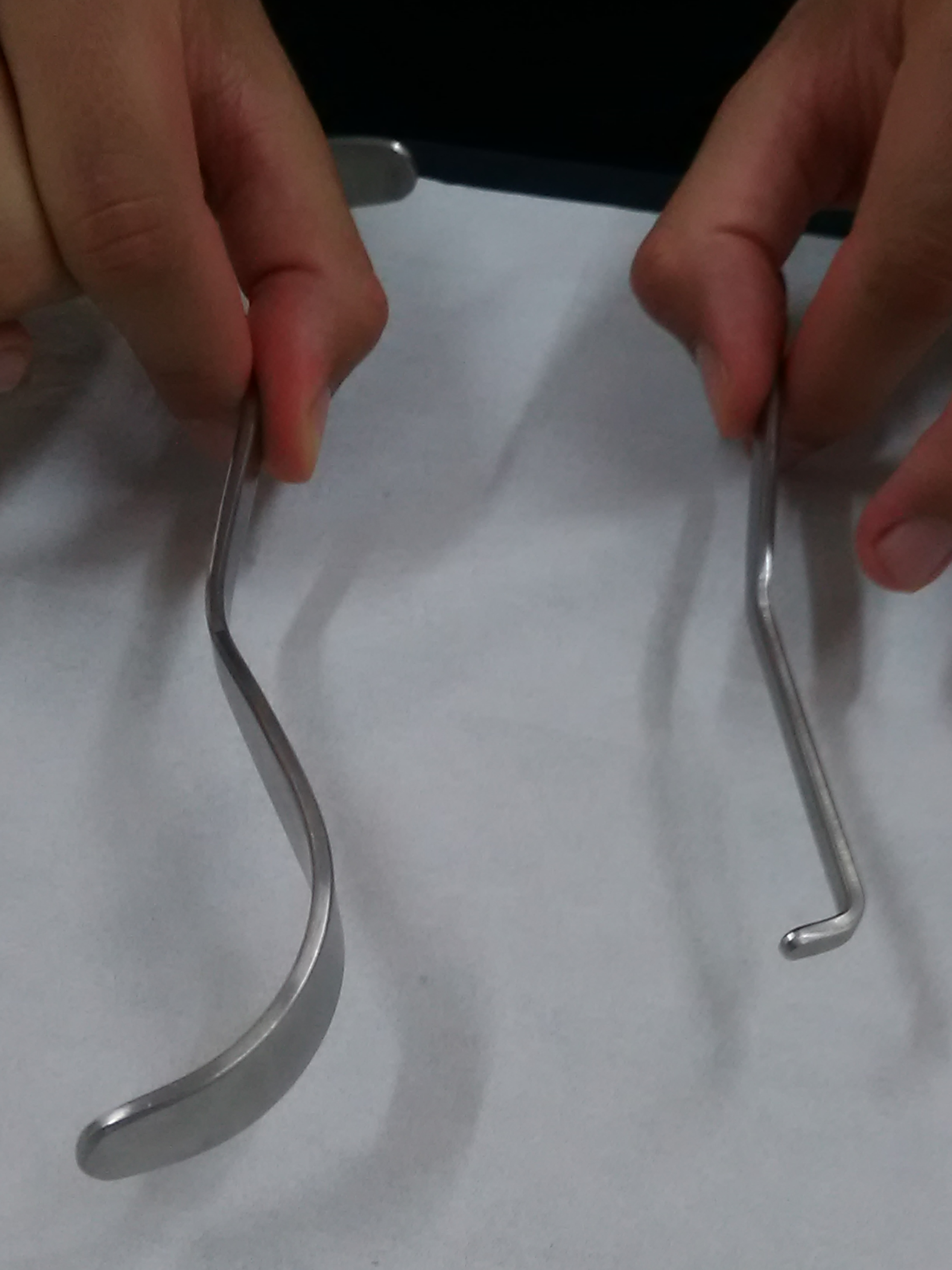 Fibrolisi diakutaneorako erabiltzen diren kako modelo desberdinetako batzuk.